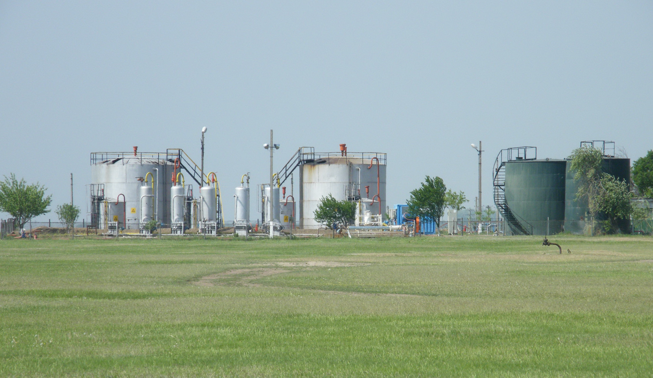 Parc de stocare si pompare a titeiului - iesirea sud-vest Bordei Verde Restricţii - fără restricţii